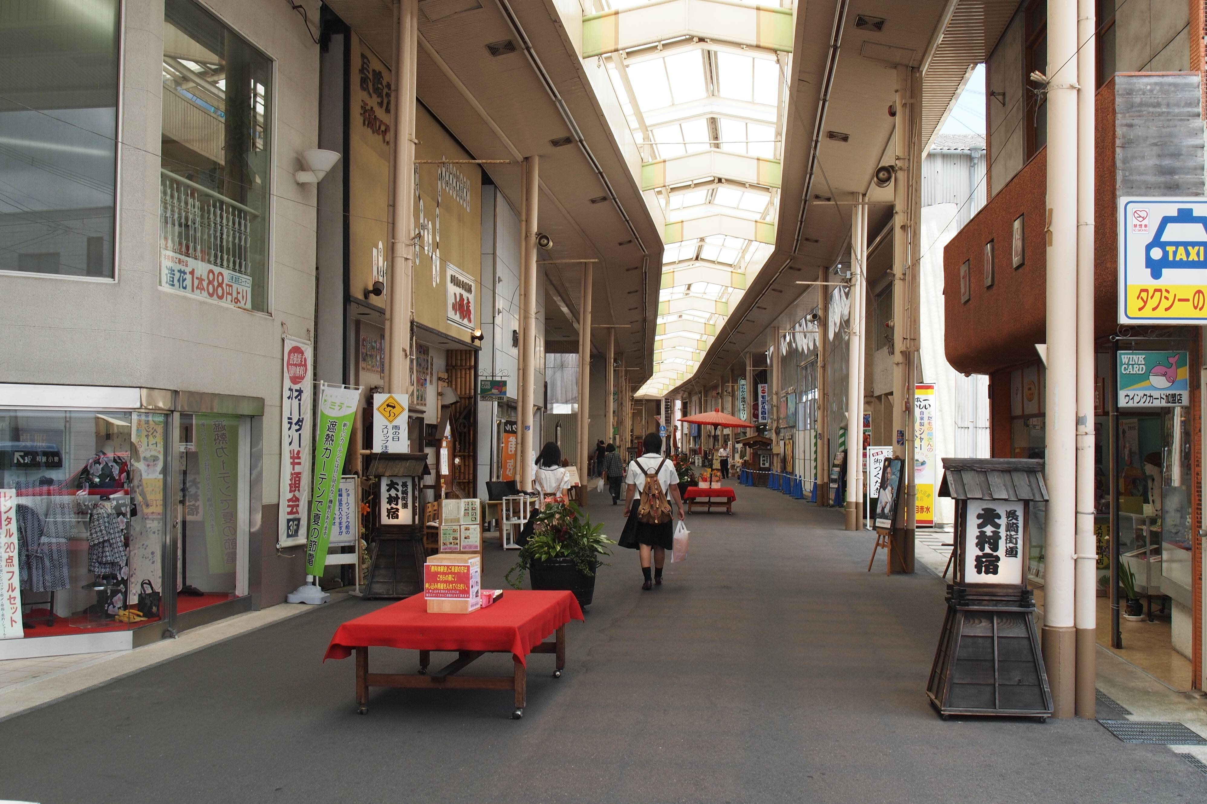 長崎県大村市の中心市街地（長崎県大村市）。